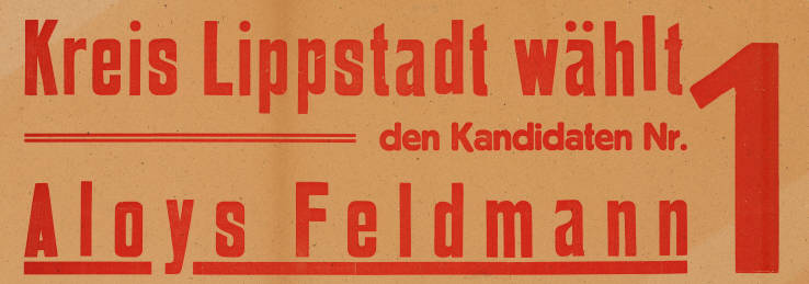 Kreis Lippstadt wählt den Kandidaten Nr. 1 Aloys Feldmann Kommentar: Plakat aus Lippstadt Plakatart: Kandidaten-/Personenplakat ohne Porträt Objekt-Signatur: 10-009 : 78 Bestand: Landtagswahlplakate Nordrhein-Westfalen (10-009) GliederungBestand10-18: Landtagswahlplakate Nordrhein-Westfalen (10-009) » Landtagswahl am 20.4.1947 » Kandidaten-/Personenplakate Lizenz: KAS/ACDP 10-009 : 78 CC-BY-SA 3.0 DE